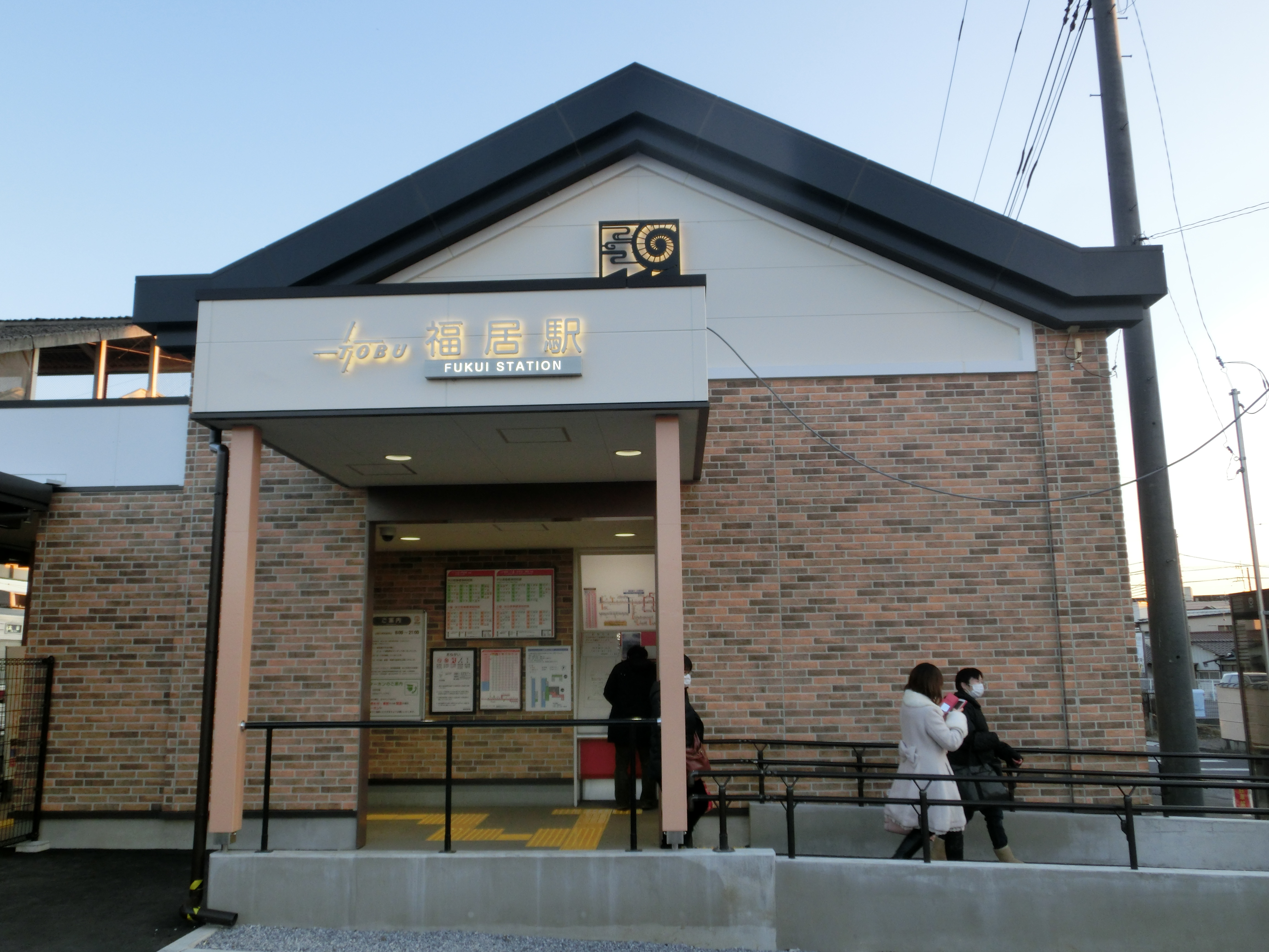 新装した福居駅舎